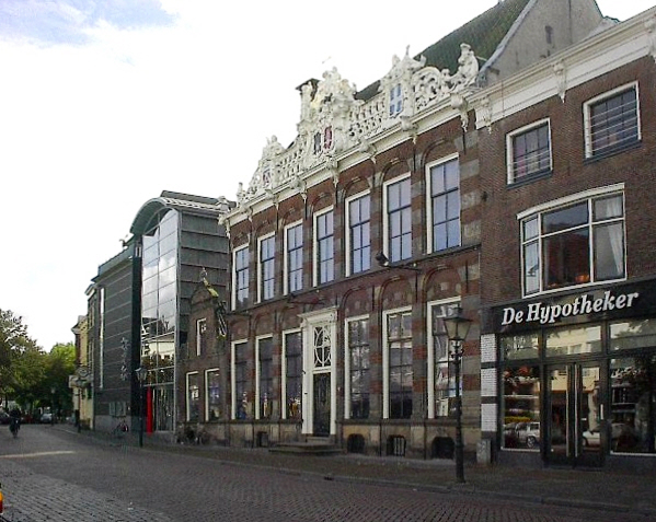 Drostenhuis in Zwolle, Melkmarktstraat 41